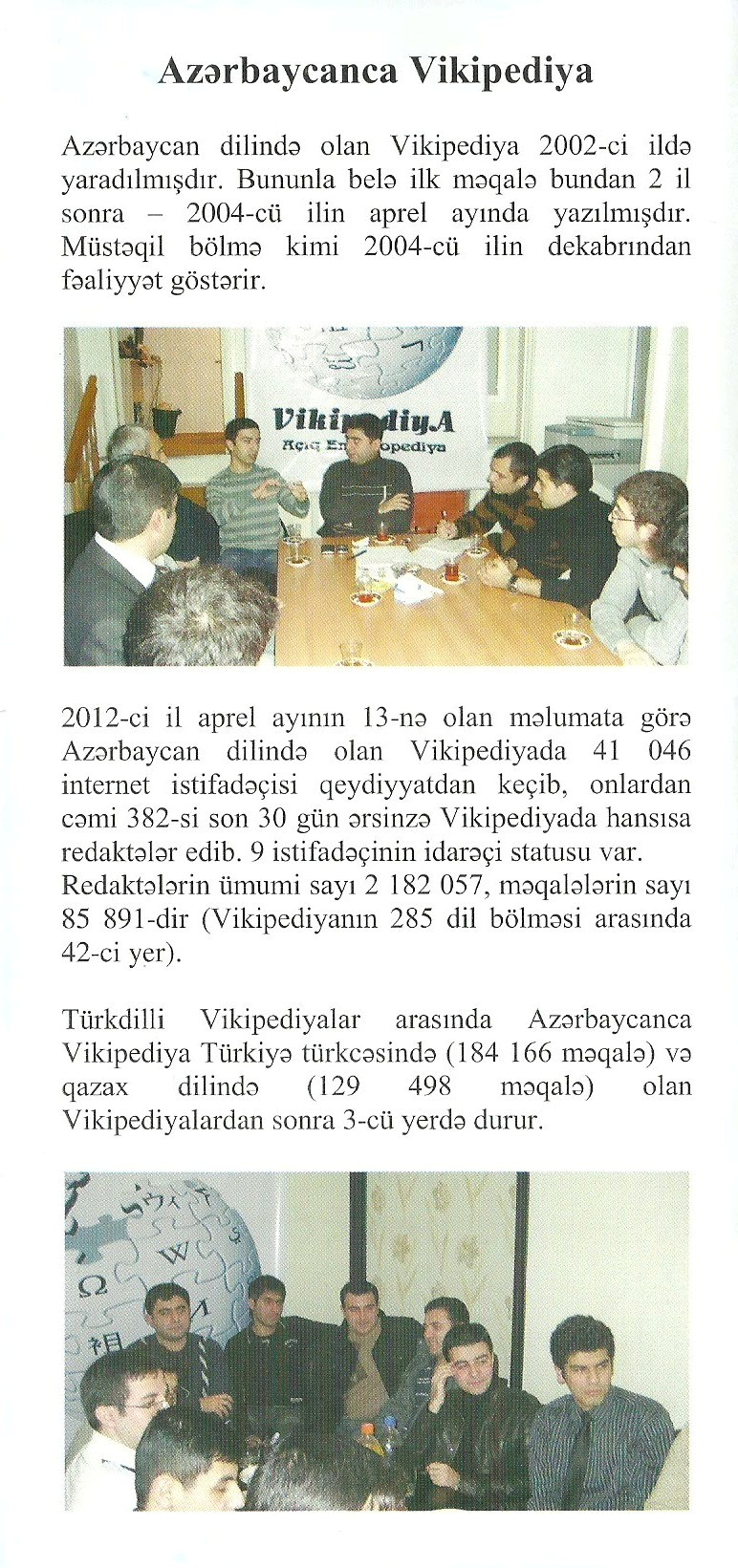 Vikipediya-Azərbaycan İB-nin ilk bukleti